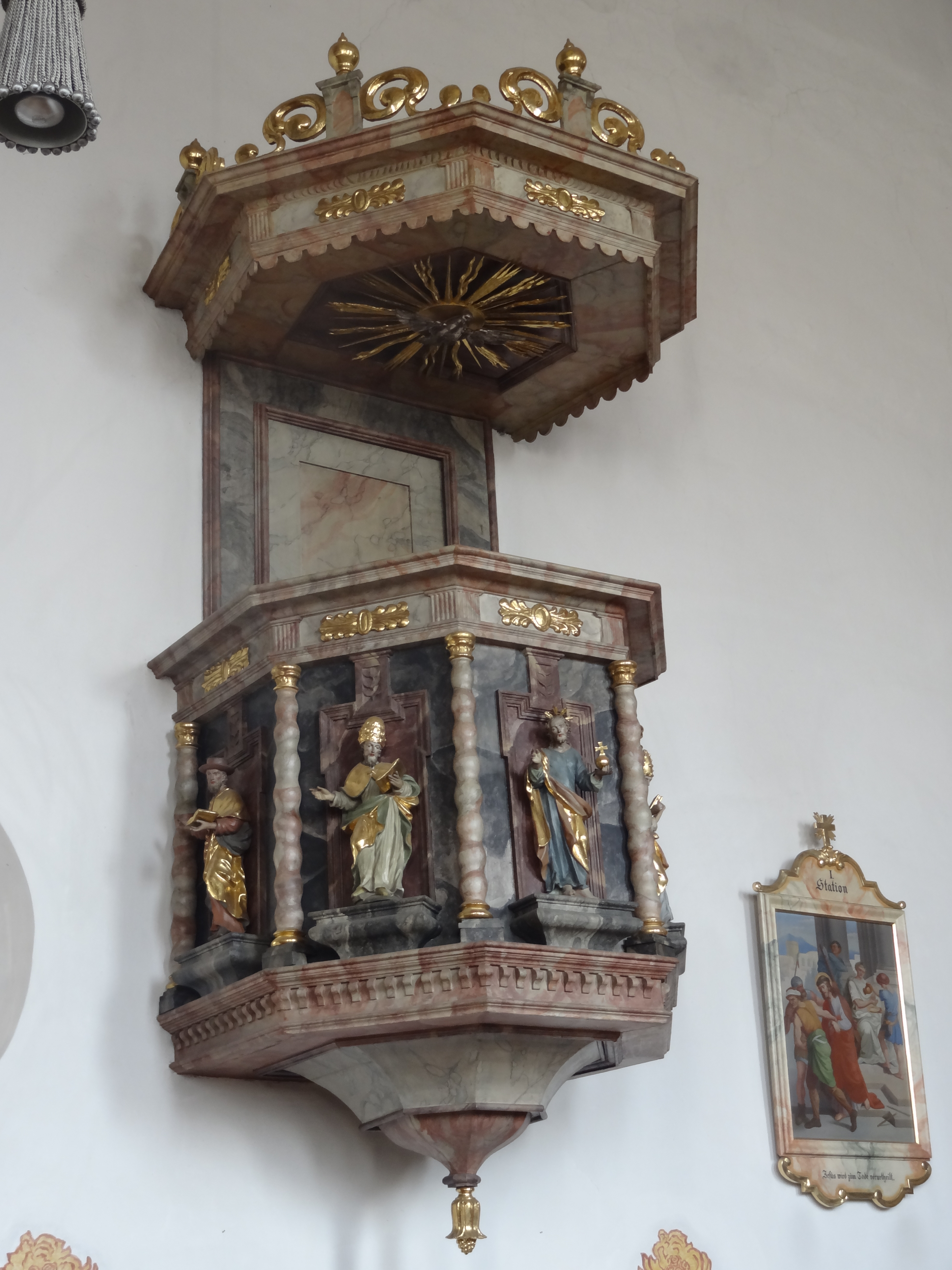 Kanzel der Pfarrkirche Mariä Heimsuchung in Ergolding